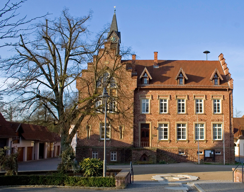 Rathaus Wiesenbach, Baden